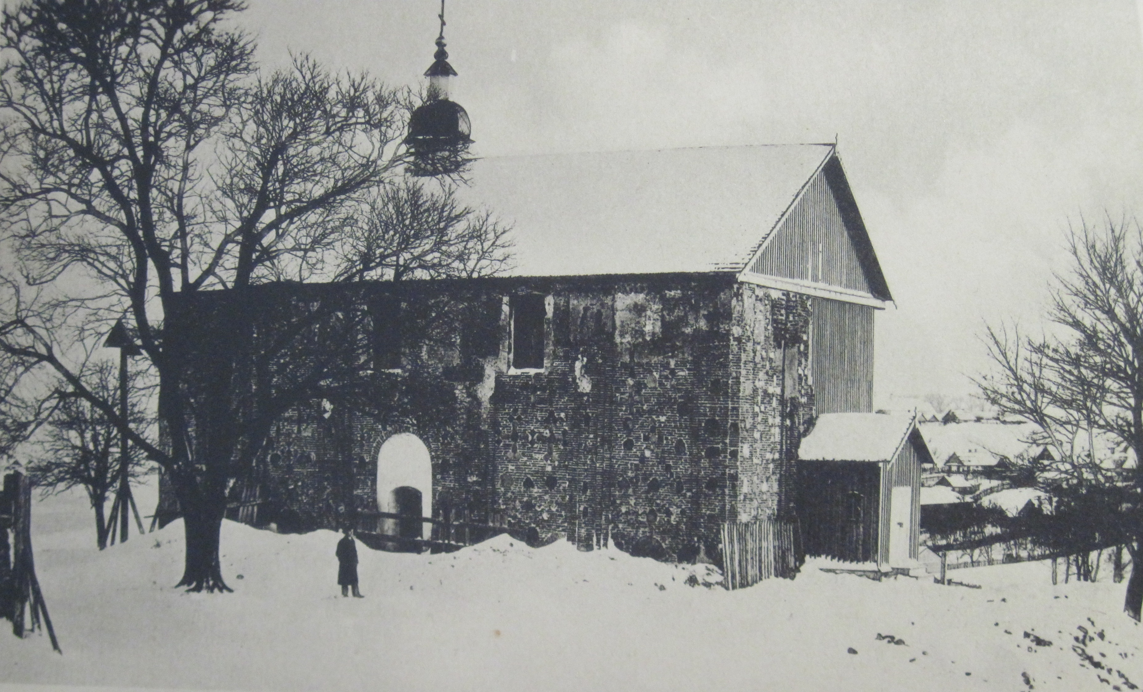 Каложская царква пасля кансервацыі. 1897 г. This is a photo of Belarusian heritage monument. Reference number: 410Г000004 ( WLM)